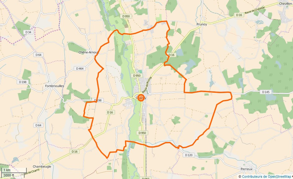 Charny (Yonne) Limite communale This map may be incomplete, and may contain errors. Don't rely solely on it for navigation.